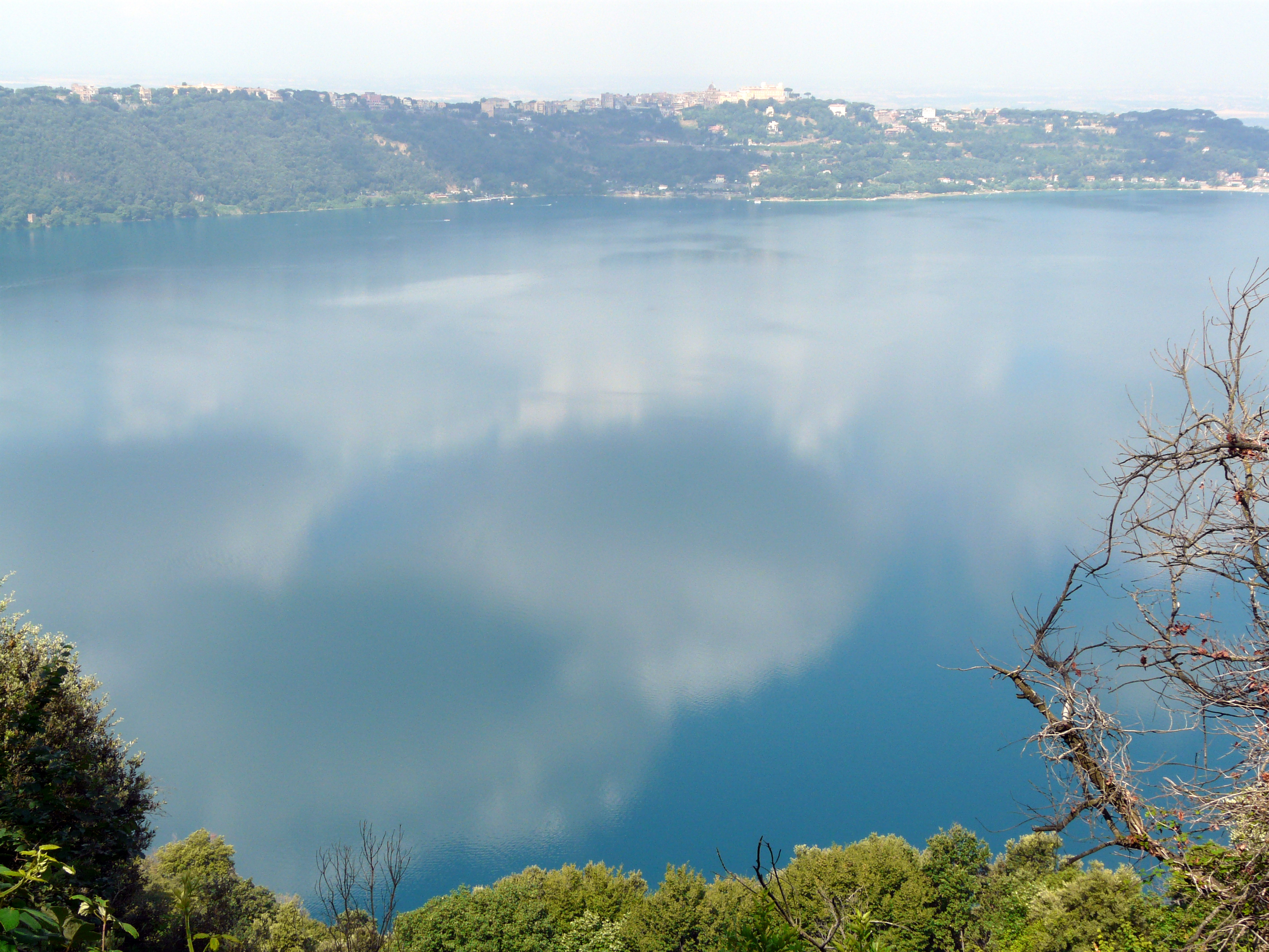 Panorama di Castel Gandolfo ed il lago Albano